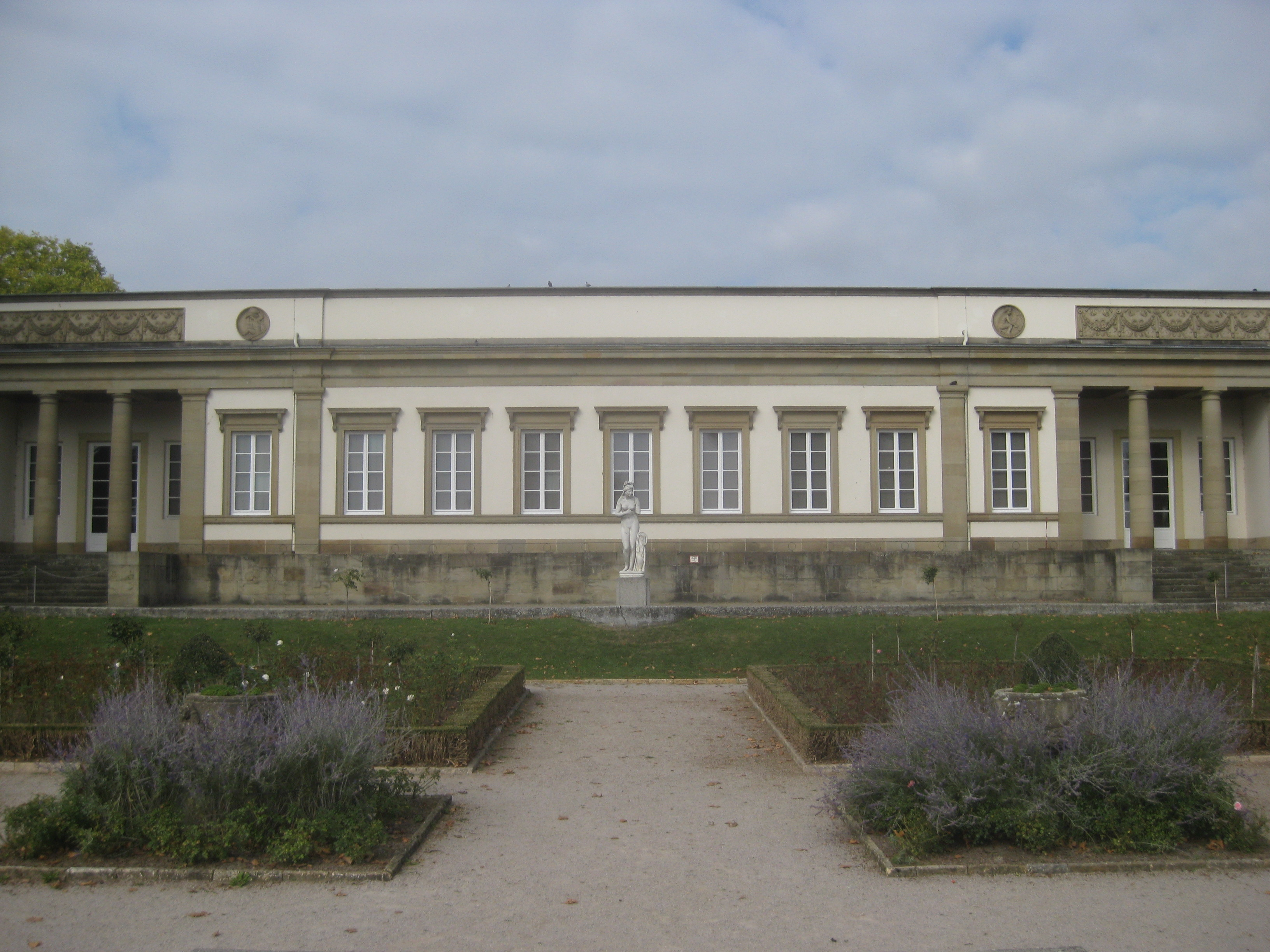 Ostfassade und Rosengarten von Schloss Rosenstein in Stuttgart.